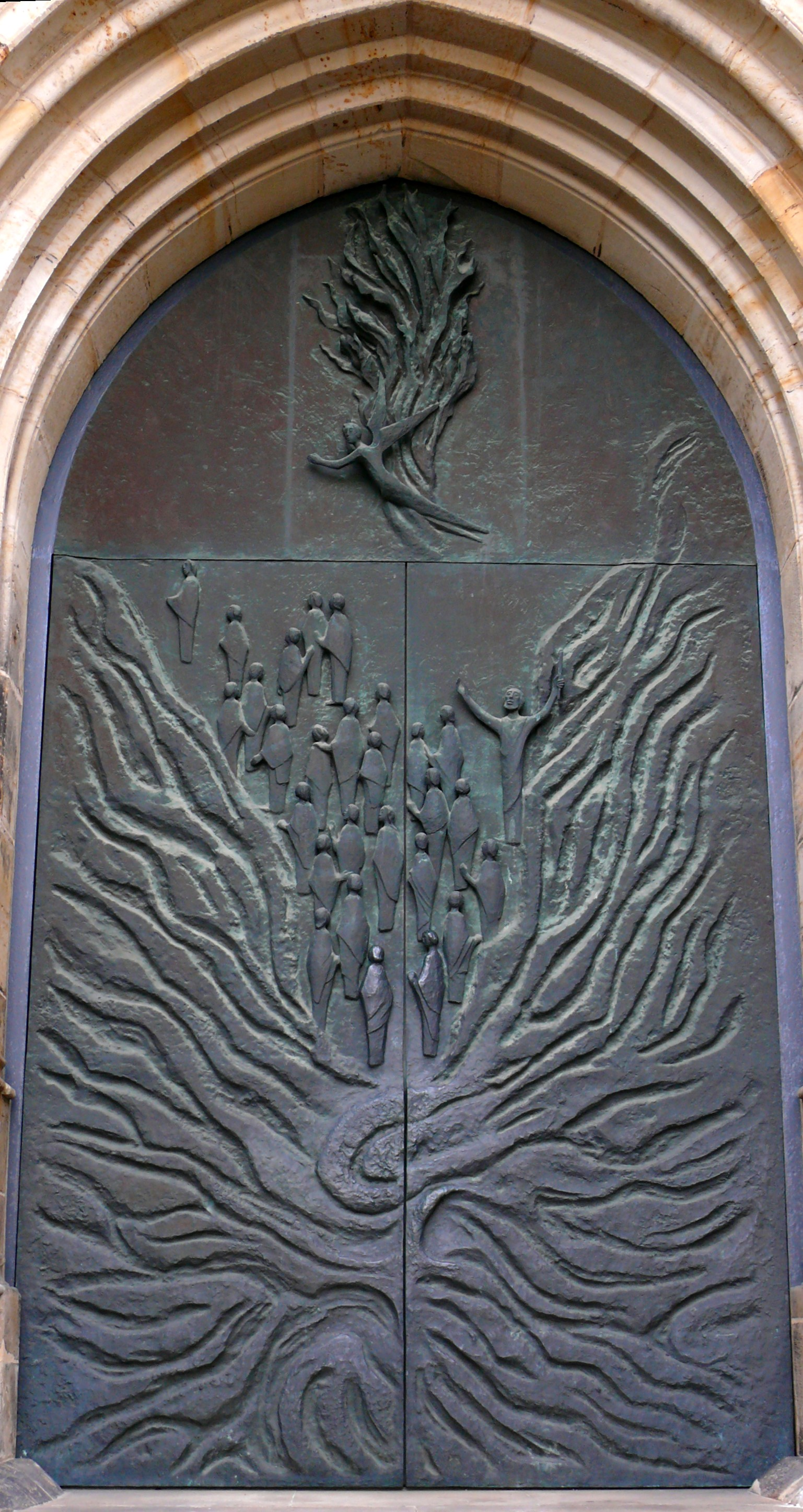 Durchzug durch das Schilfmeer - Türplastik an der Andreaskirche in Hildesheim